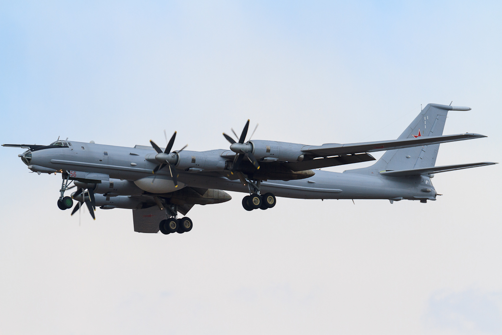 _MG_0277